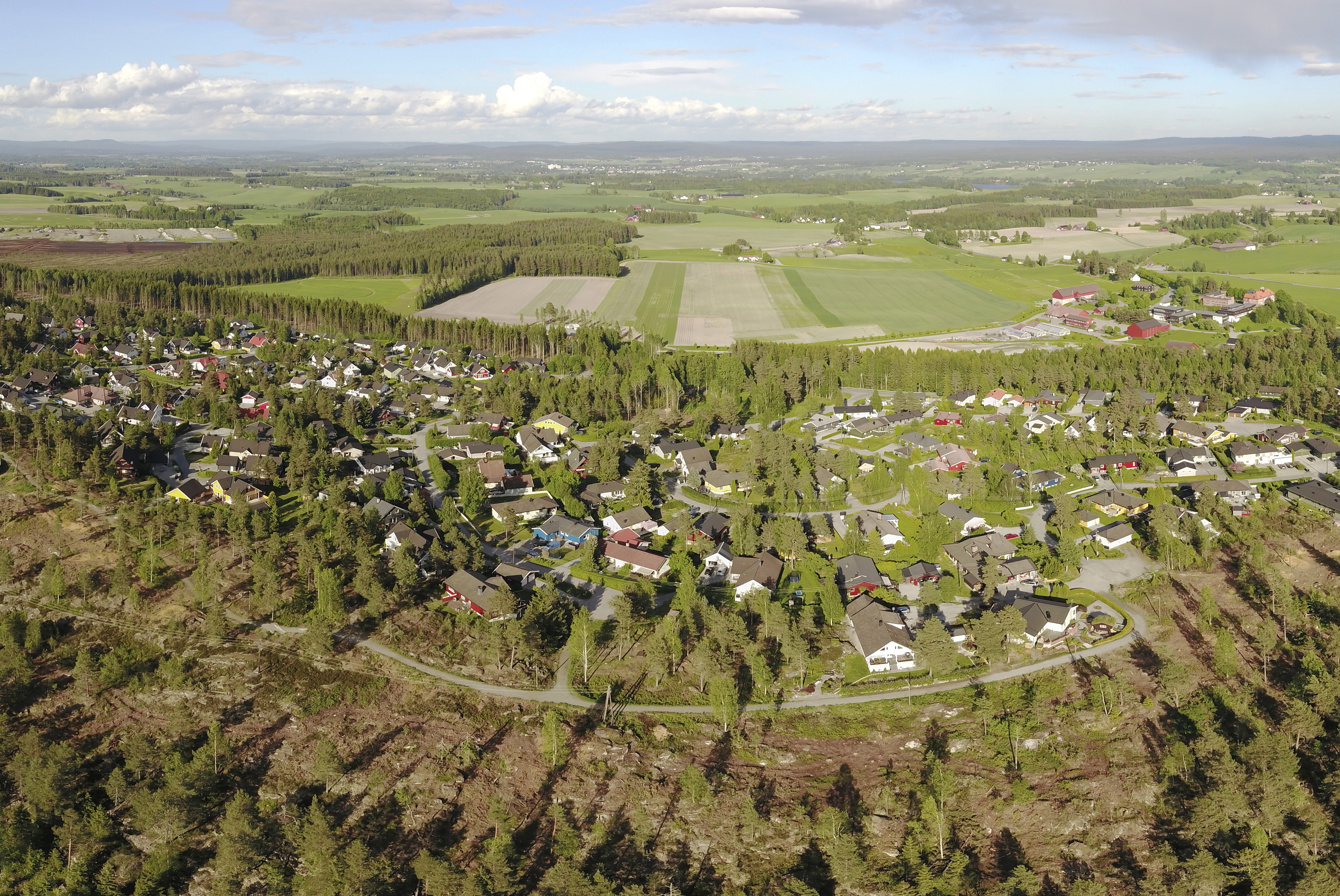 Tomteråsen i Nes